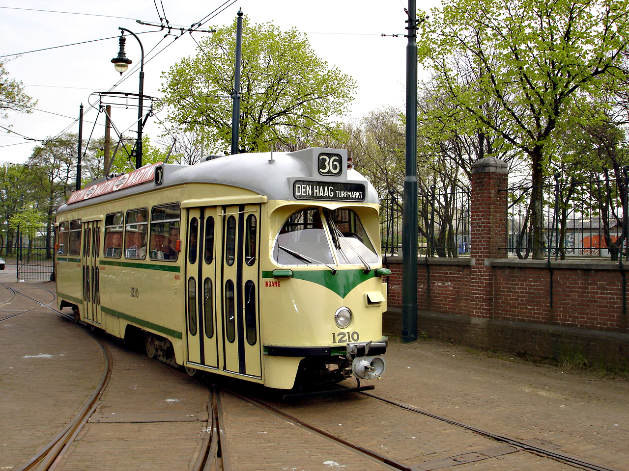 PCC 1210 HOVM Den Haag